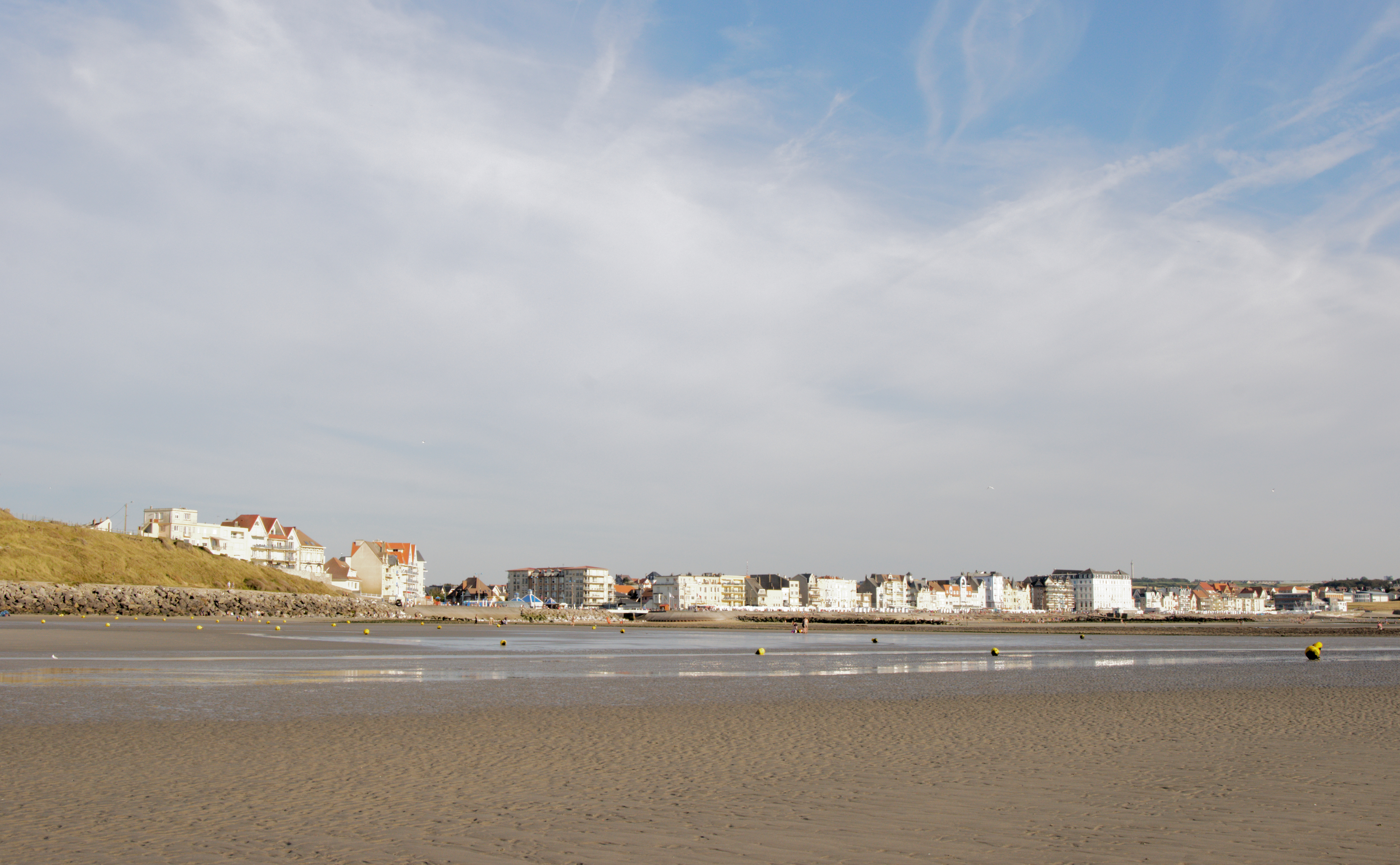 Basse marée à la plage de Wimereux